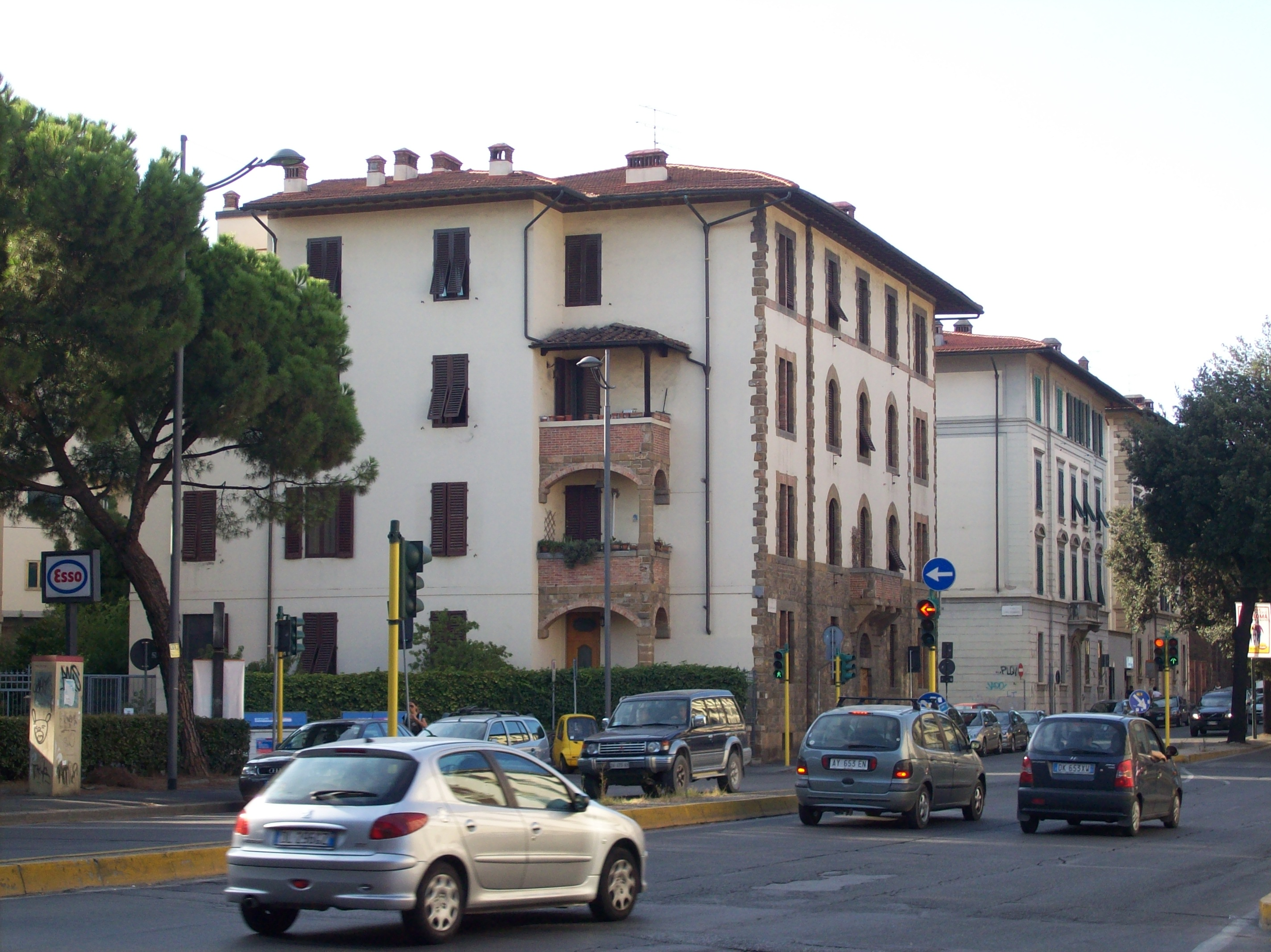 particolare dello Statuto